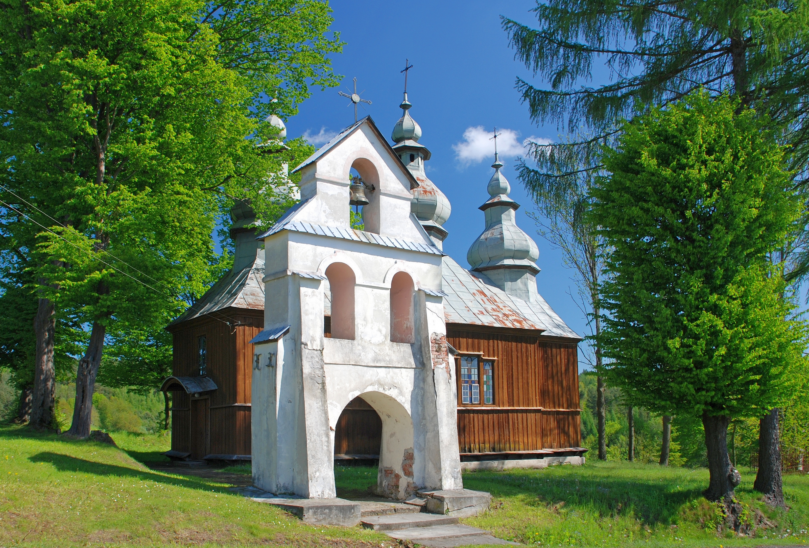 wieś Jawornik Ruski